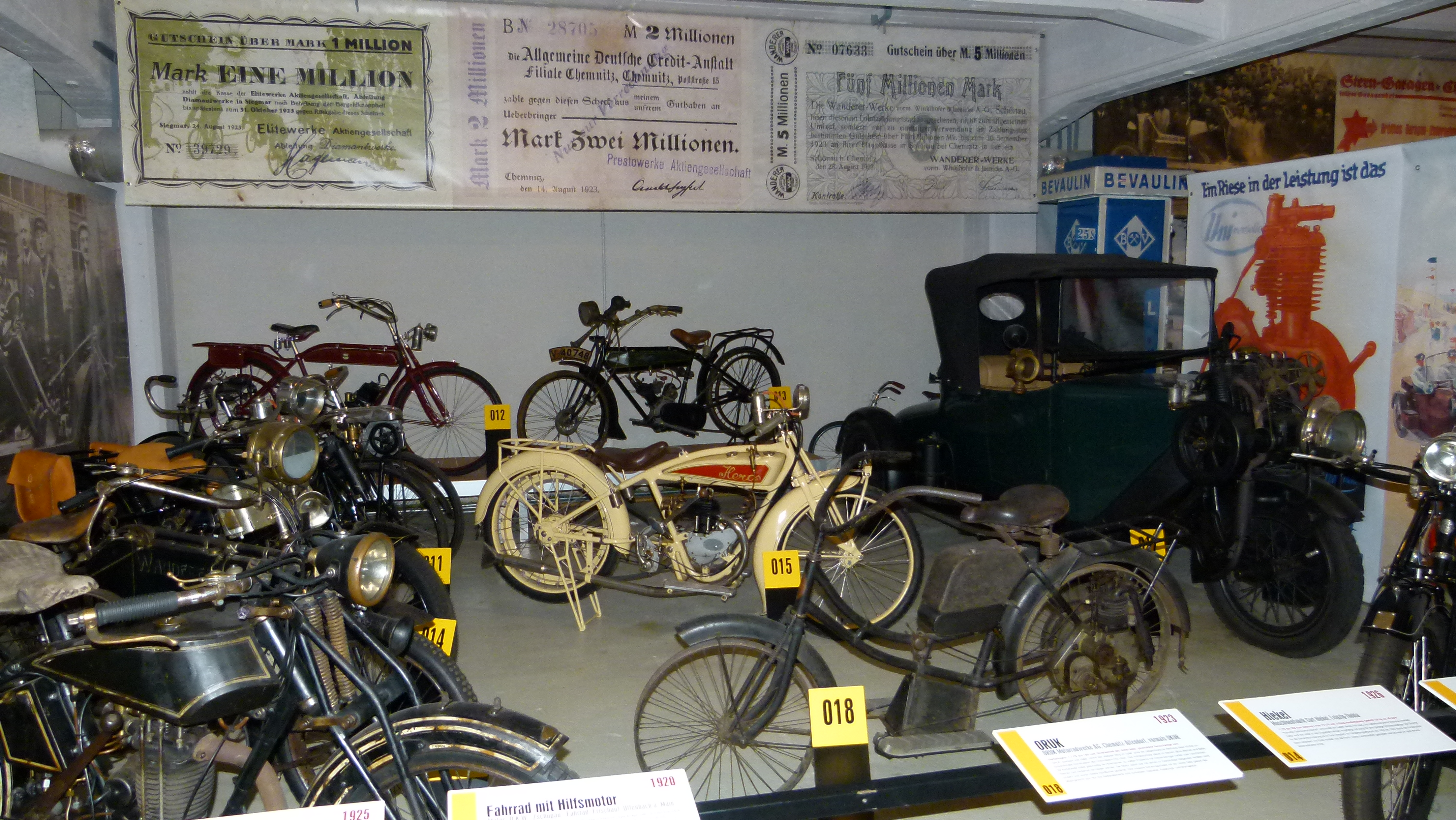 Museum für sächsische Fahrzeuge, Chemnitz